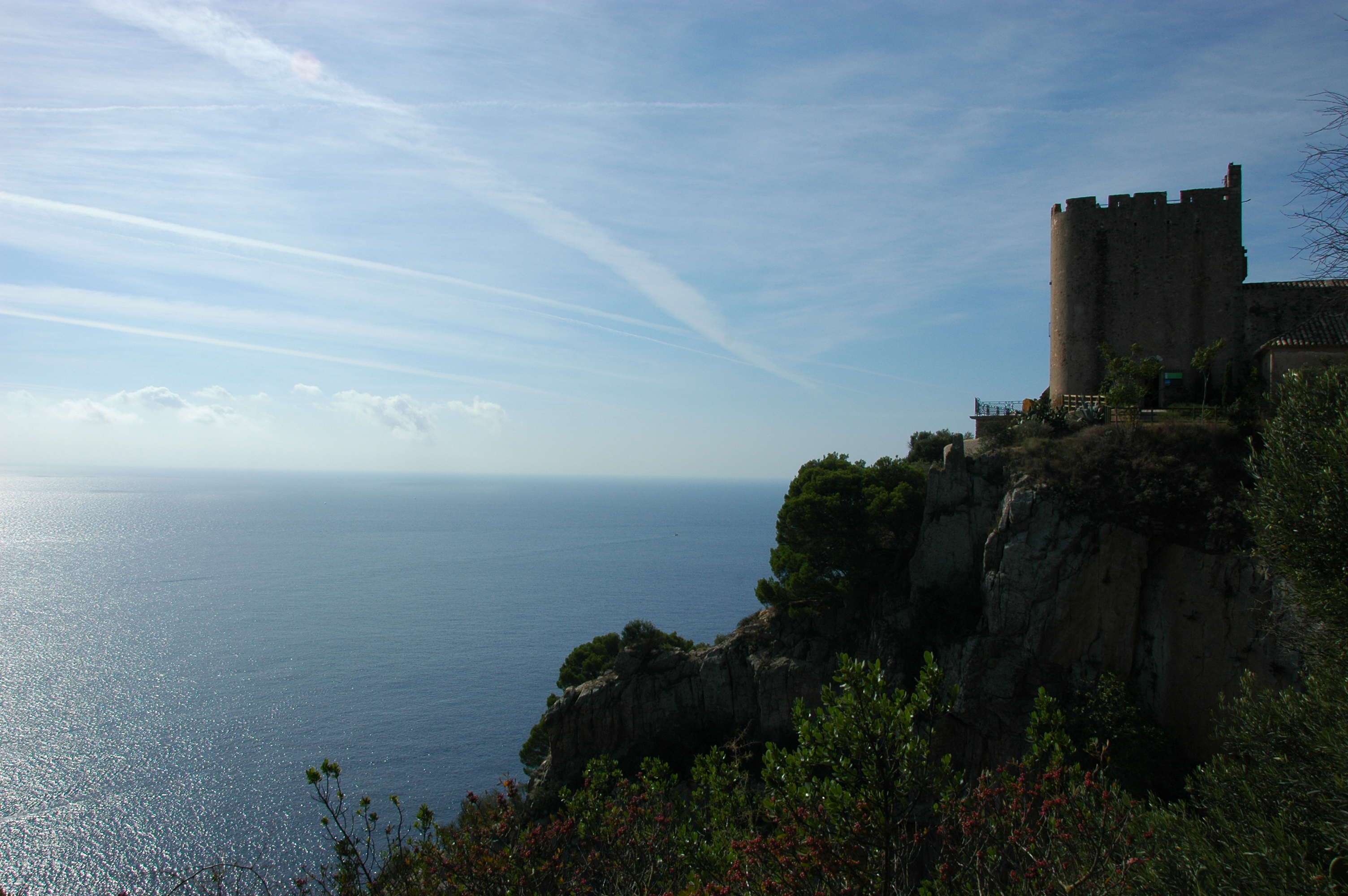 Vista general de la torre de guaita de Sant Sebastià, damunt del penya-segat del Salt de Romaboira.